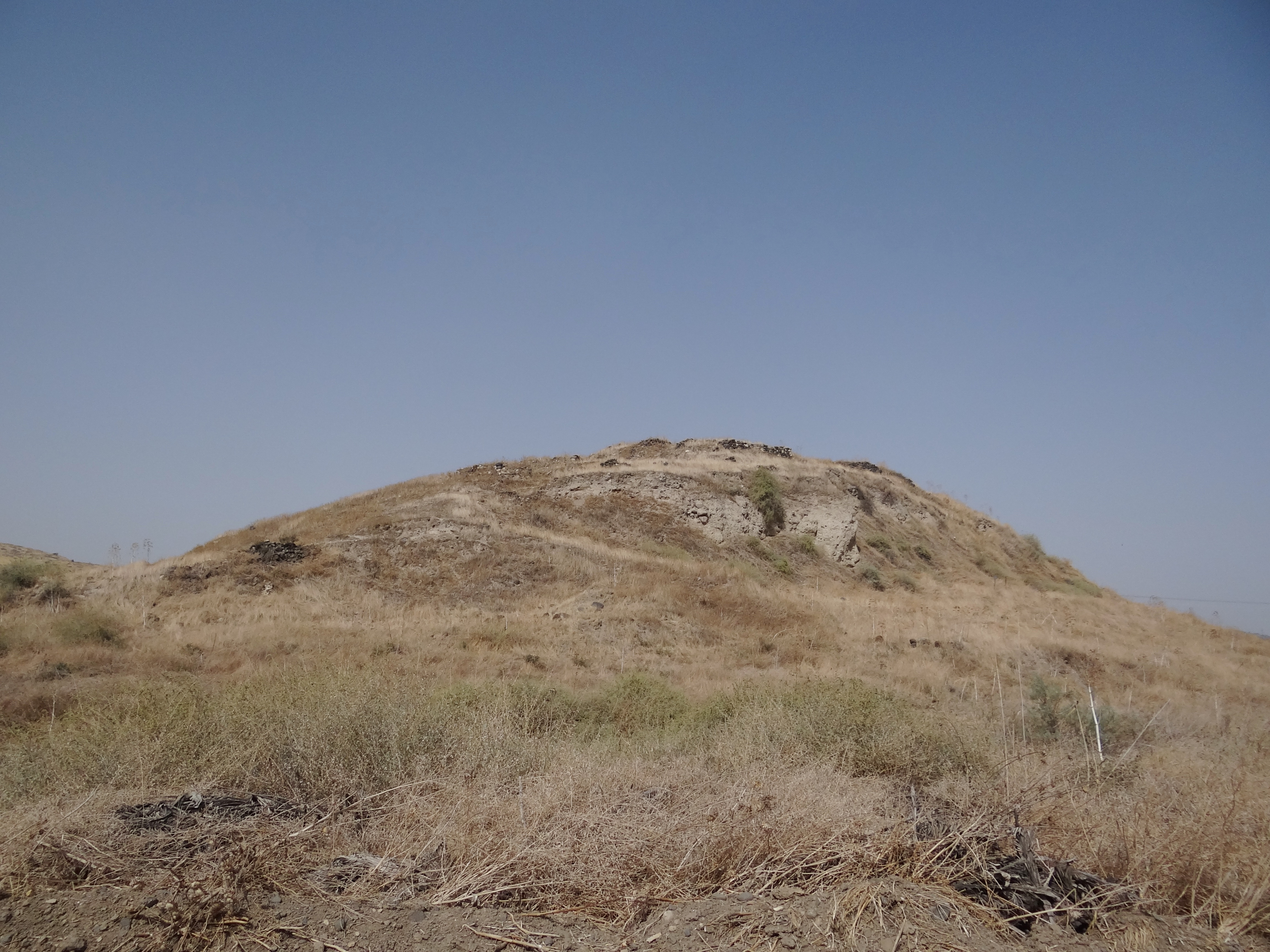 Tel Ubeidiya 3 km south of Lake Tiberias, in the Jordan Rift Valley, Israel, is an archaeological site of the Pleistocene תל עובדיה הוא תל בין המושבה מנחמיה לקיבוץ בית זרע, אשר בקרבתו אתר פרהיסטורי הנחשב לאחד האתרים הקדומים ביותר בעולם ובעל חשיבות רבה בקנה מידה עולמי להבנת האבולוציה של האדם.